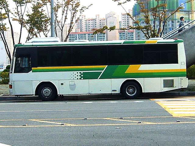 1992~1994 Asia Motors AM818 Cosmos